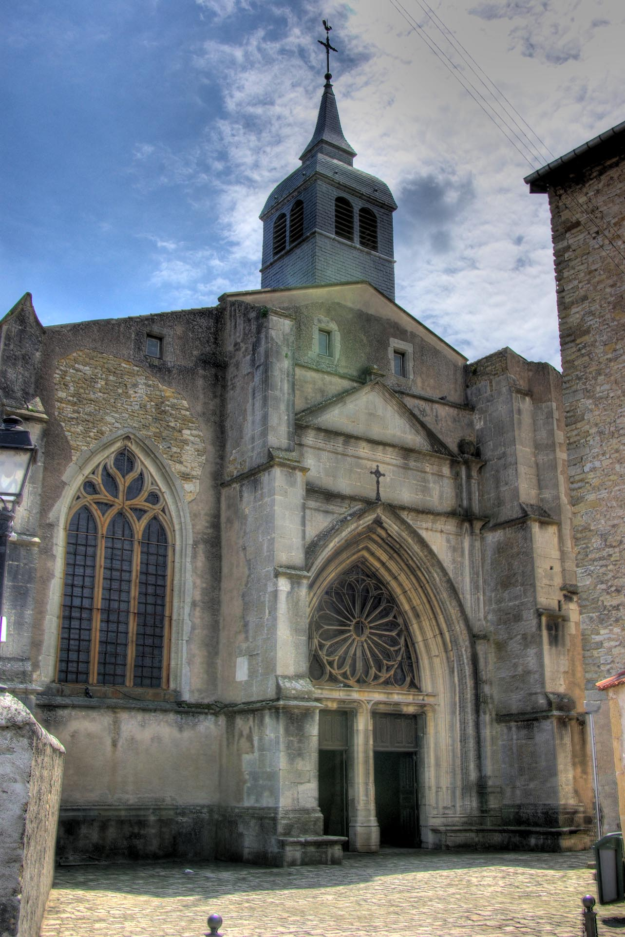 Église St Gorgon de la ville de Varangeville (54)